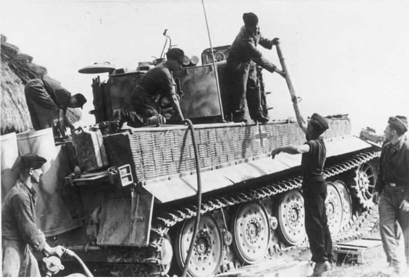 ADN-Bildarchiv, II. Weltkrieg An der deutsch-sowjetischen Front im Osten; August 1944 Ein deutscher "Tiger"-Panzer erhält neuen Treibstoff und Munition. Aufnahme: Schlegel-Breg